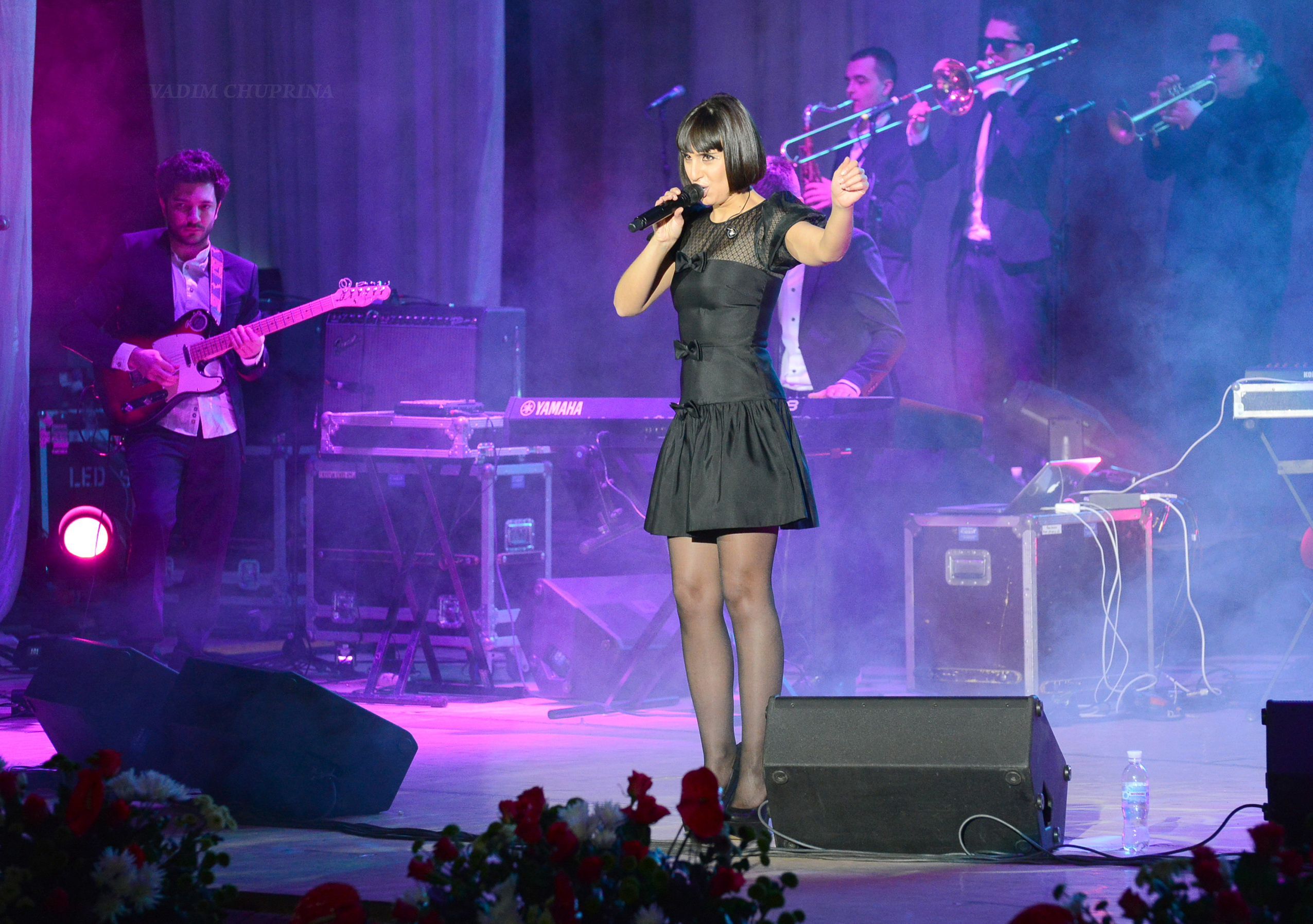 Джамала 2013